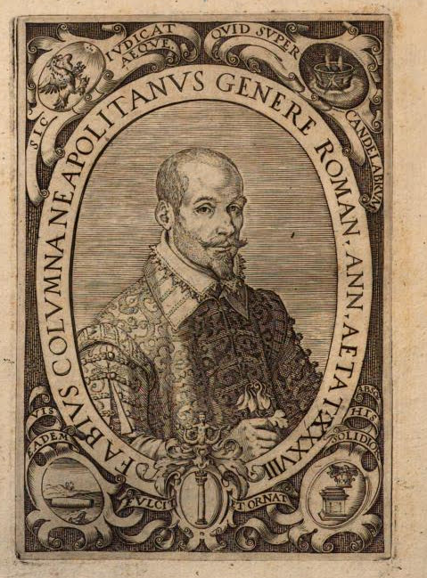 Ritratto di Fabio Colonna